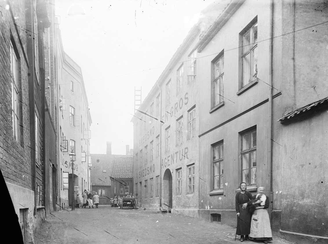 Snekkergangen på Hammersborg sett fra Hospitalsgaten. Foto: Johannes Holmsen/Oslo Museum, ca. 1912.